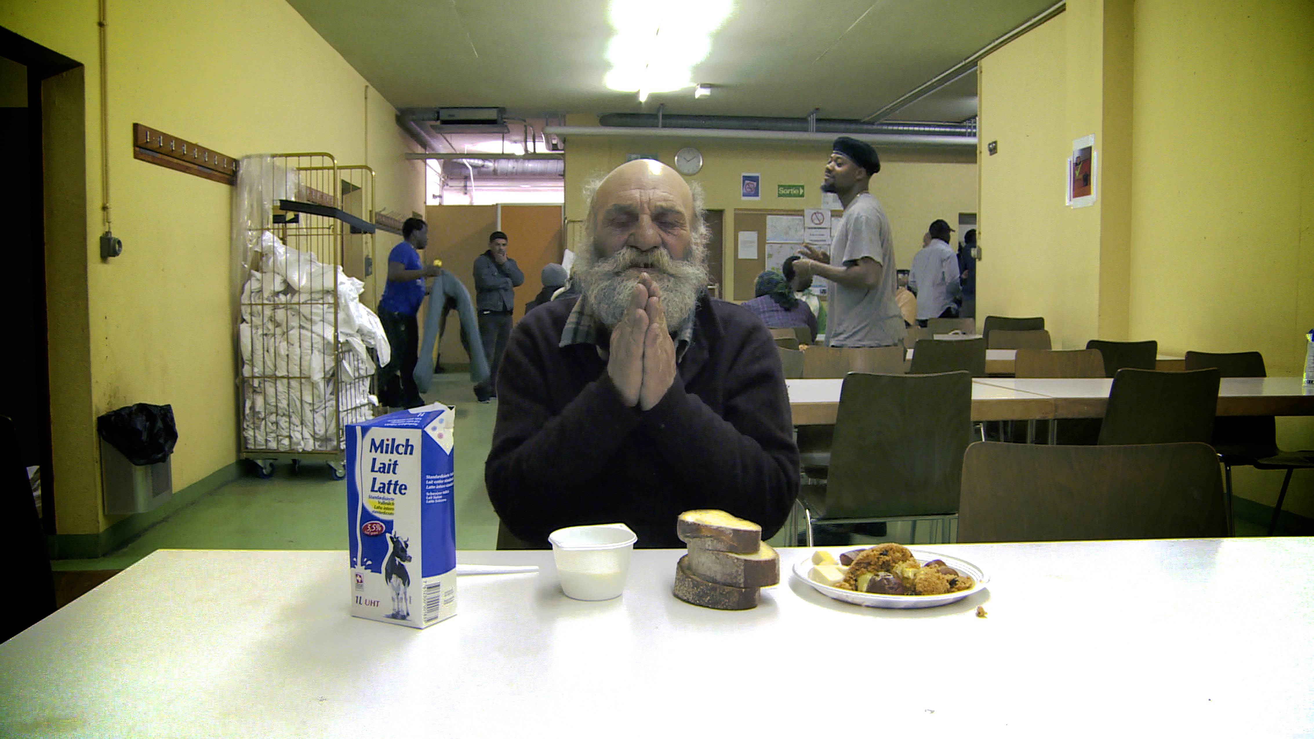 Le sans-abri Dimitri bénit son repas. Image tirée du film « L’abri » de Fernand Melgar